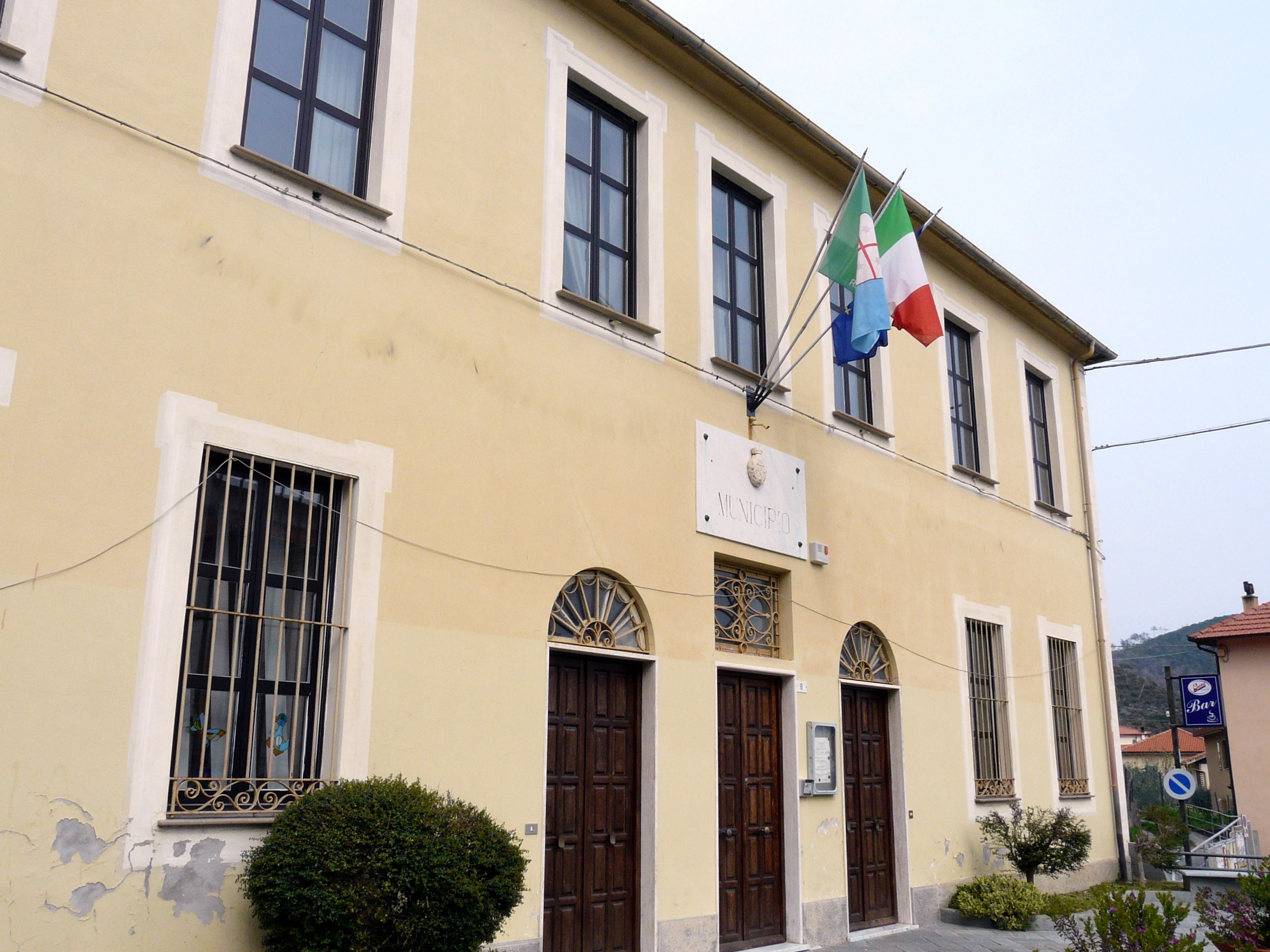 Municipio, Giustenice, Liguria, Italia